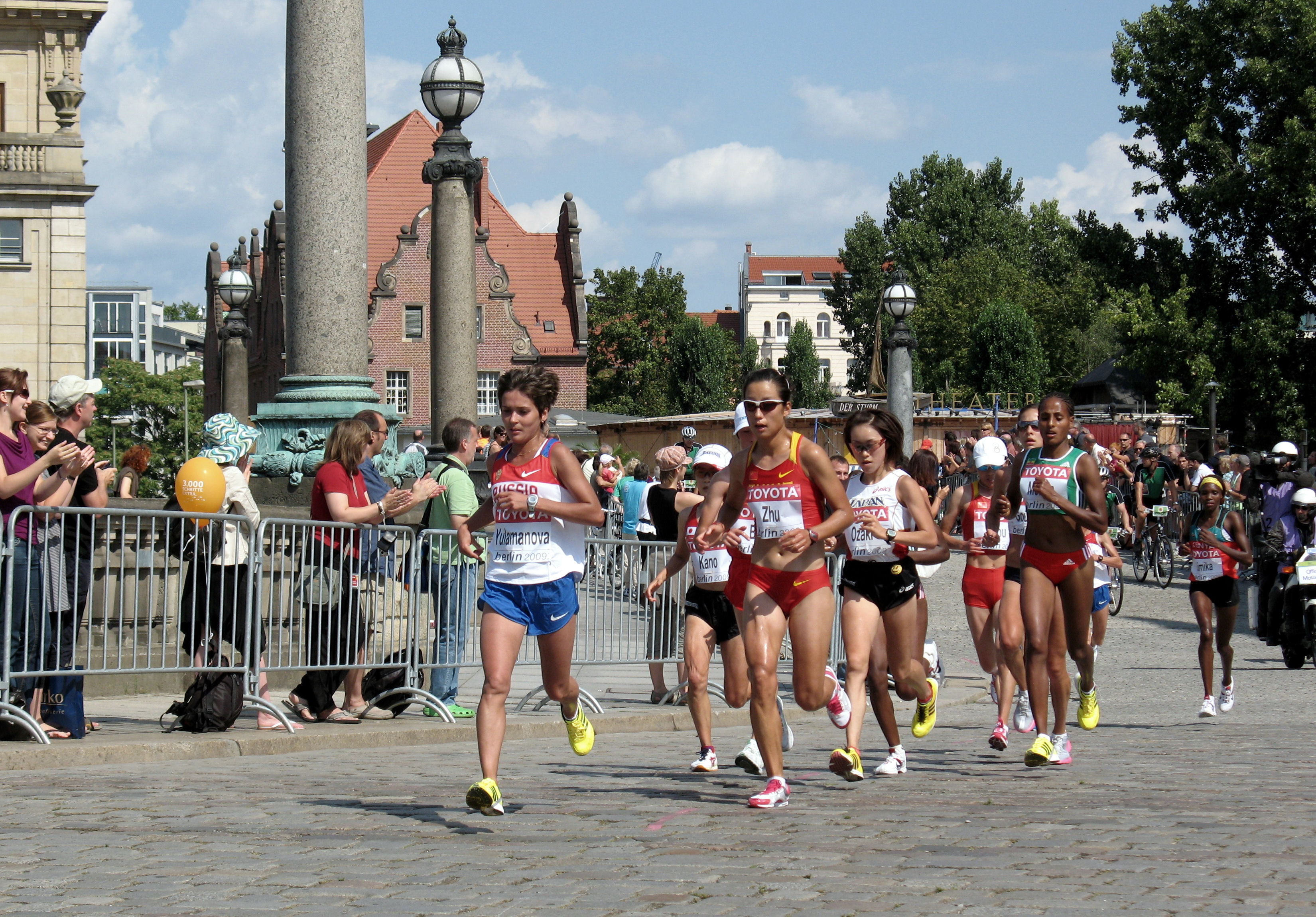 Leichtathletik-Weltmeisterschaft 2009 Marathon Frauen: v. l. n. r. Nailja Julamanowa, Zhu Xiaolin, Yuri Kanō, Yoshimi Ozaki und Aselefech Mergia, 23.08.2009